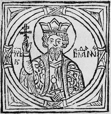 Изображение князя Владимира